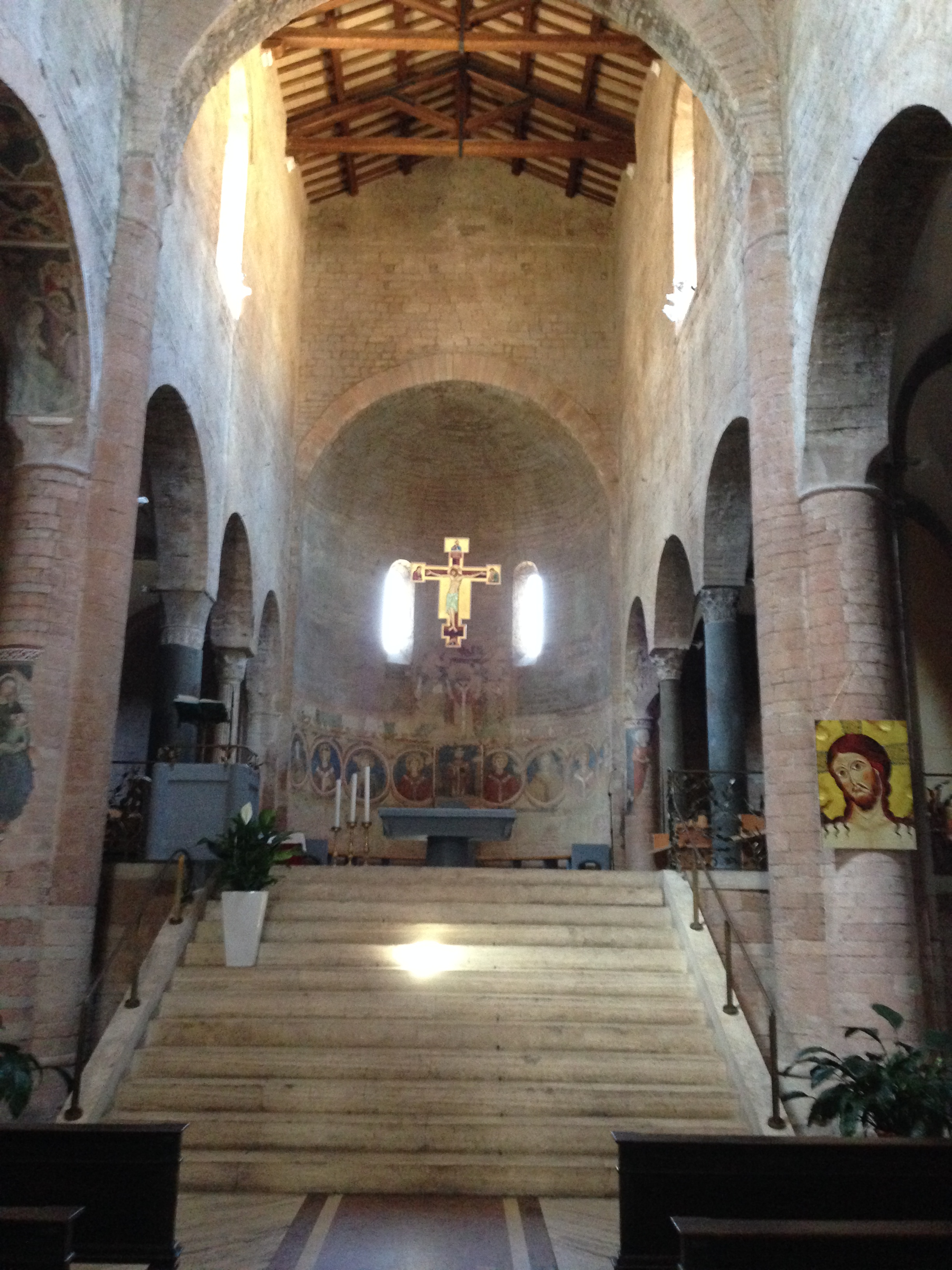 Chiesa di San Gregorio Maggiore, Spoleto. Altare